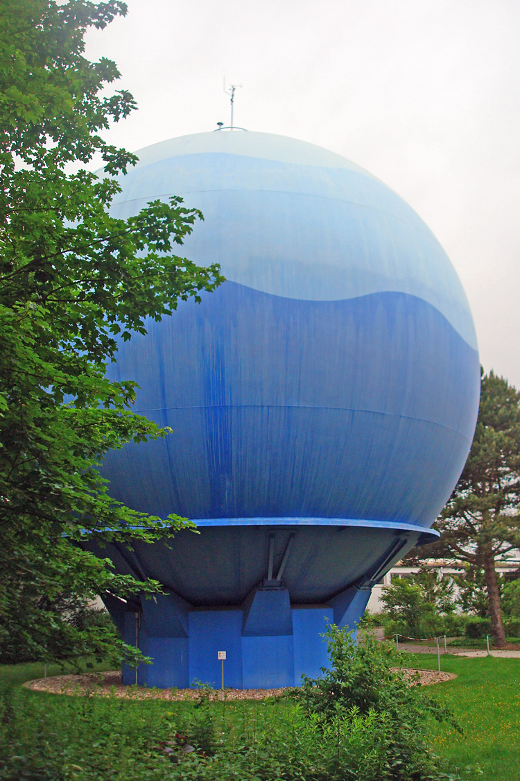 Gasometer der Stadtwerke Gütersloh This is a photograph of an architectural monument. 072